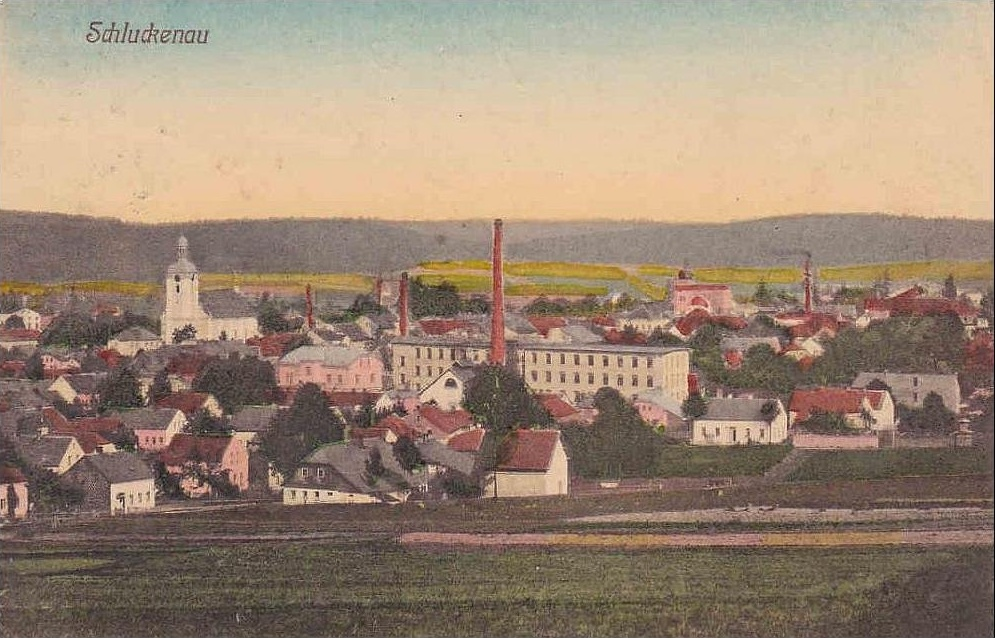 Šluknov, dobová pohlednice.